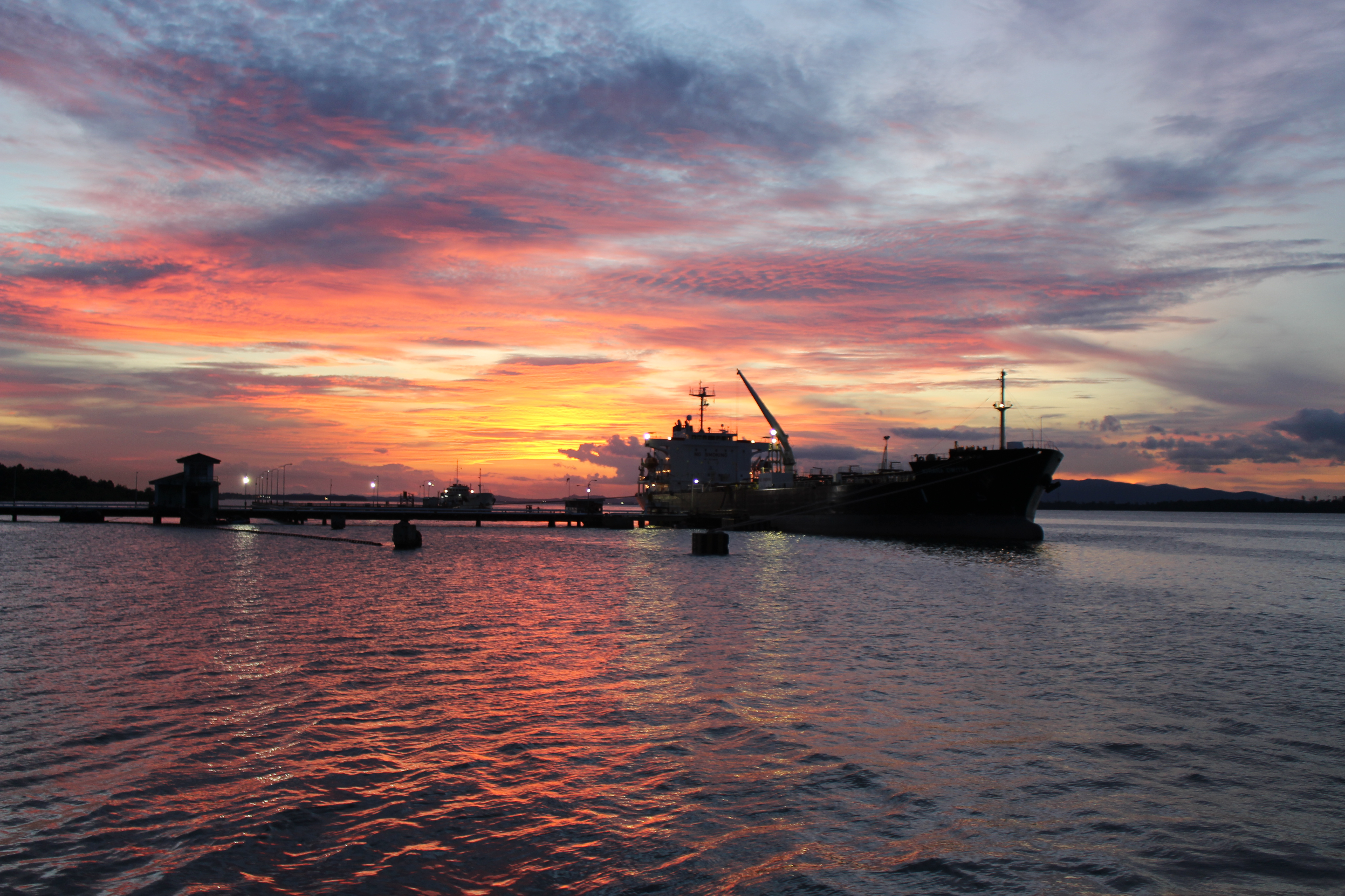 Kapal sedang sandar di pelabuhan Pertamina Kotabaru dengan latar belakang sunset.